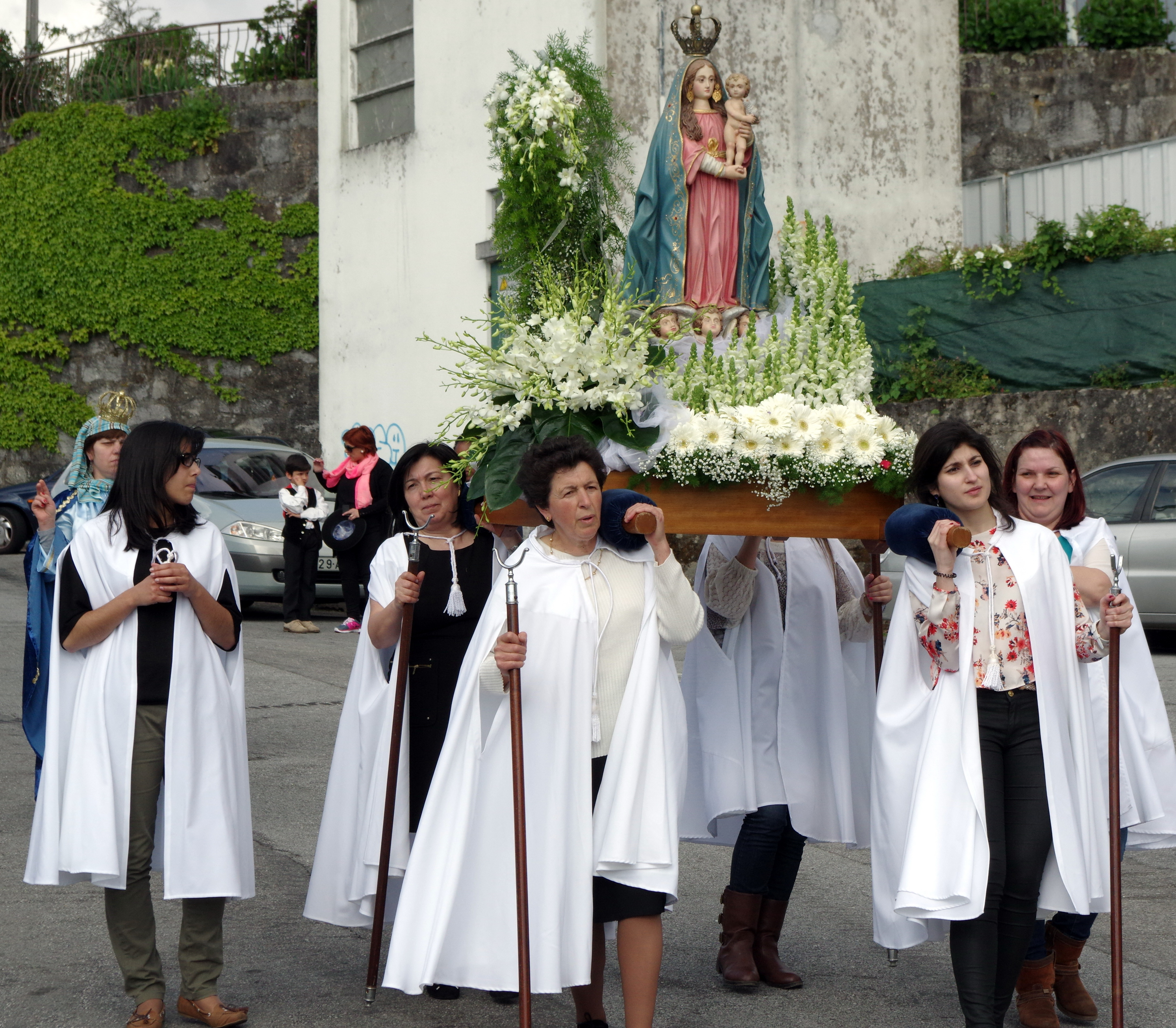 21.4.14 Lamacaes 1 Easter Monday Parade 219